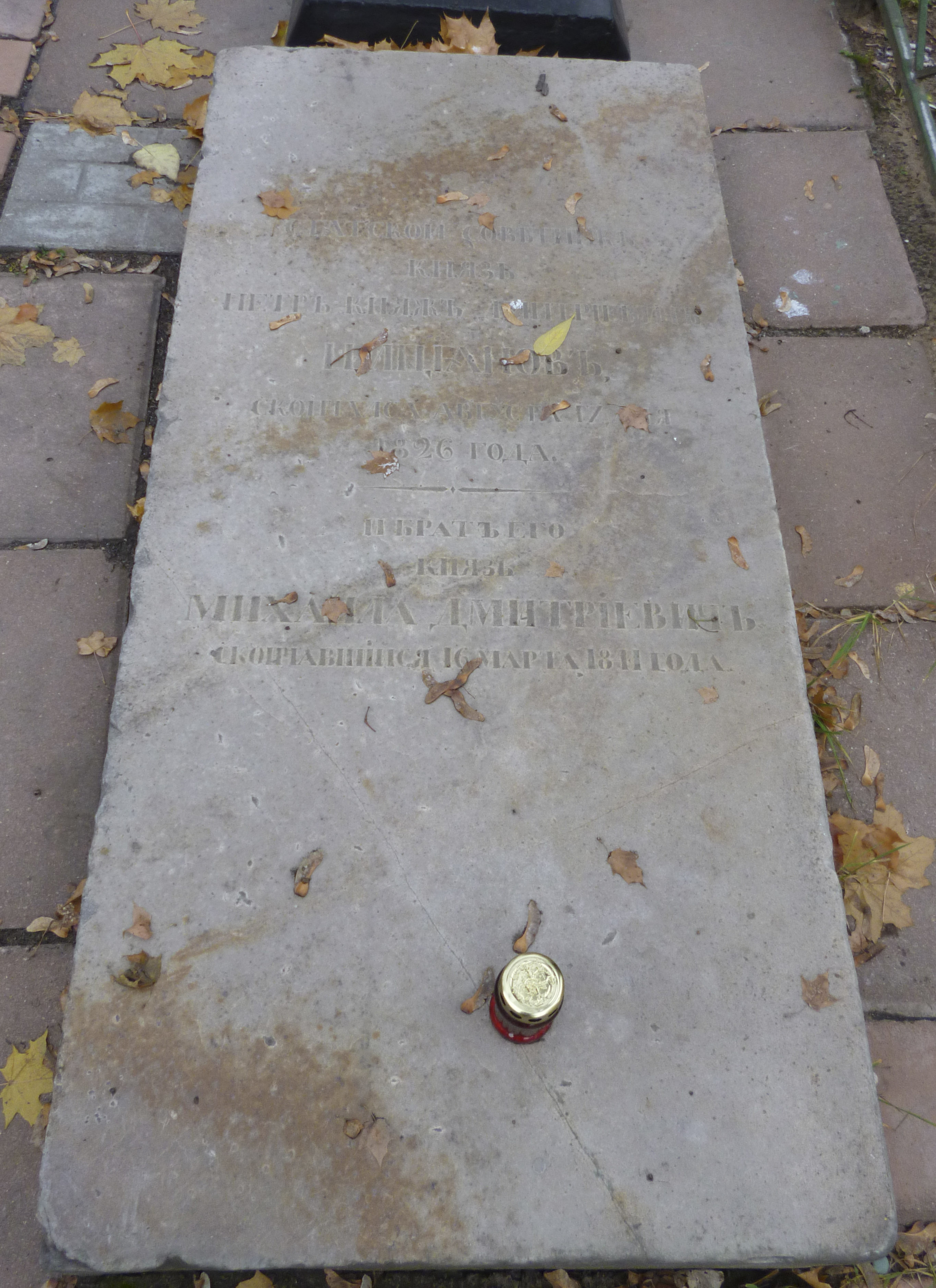 Надгробие братьев Цициановых: Петра Дмитриевича (1783—1826) и Михаила Дмитриевича (1765—1841). Церковь Всех Святых (Москва, Ленинградский проспект, 73)